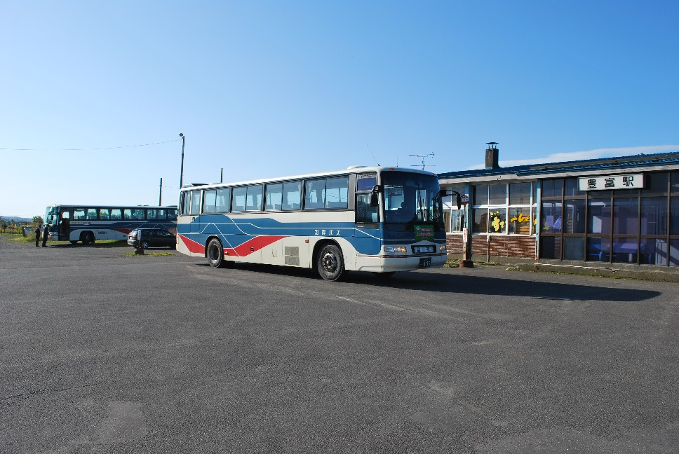 沿岸バス豊富留萌線。北海道天塩郡豊富町豊富駅前で撮影。